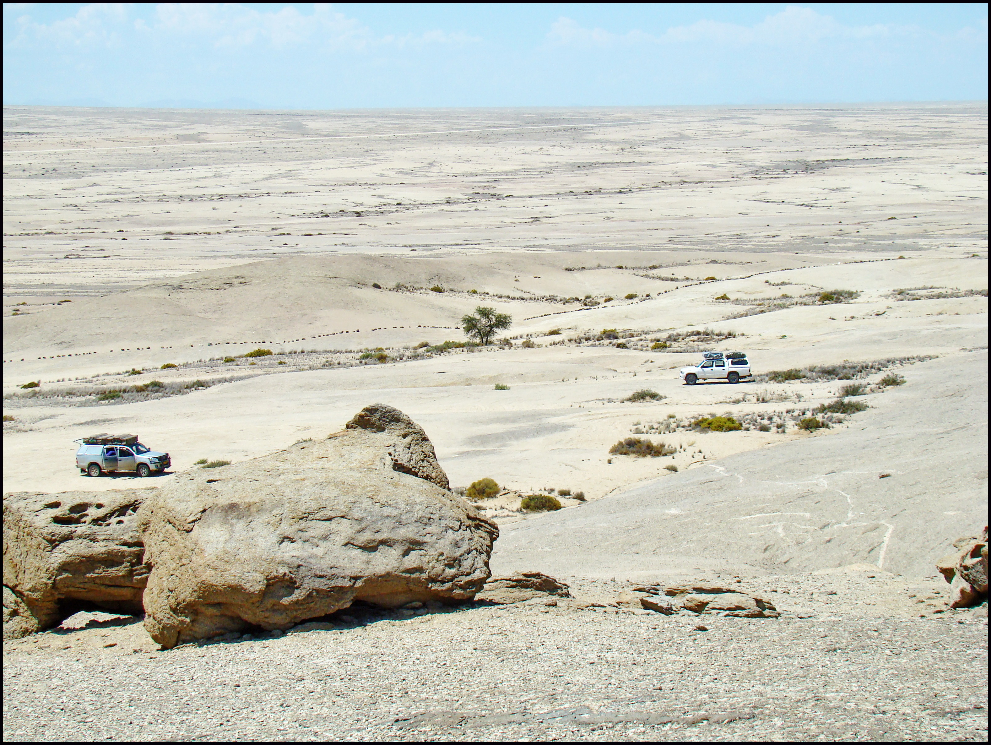 Пустыня Намиб. Передний план - дефляционные равнины по гранитоидам.